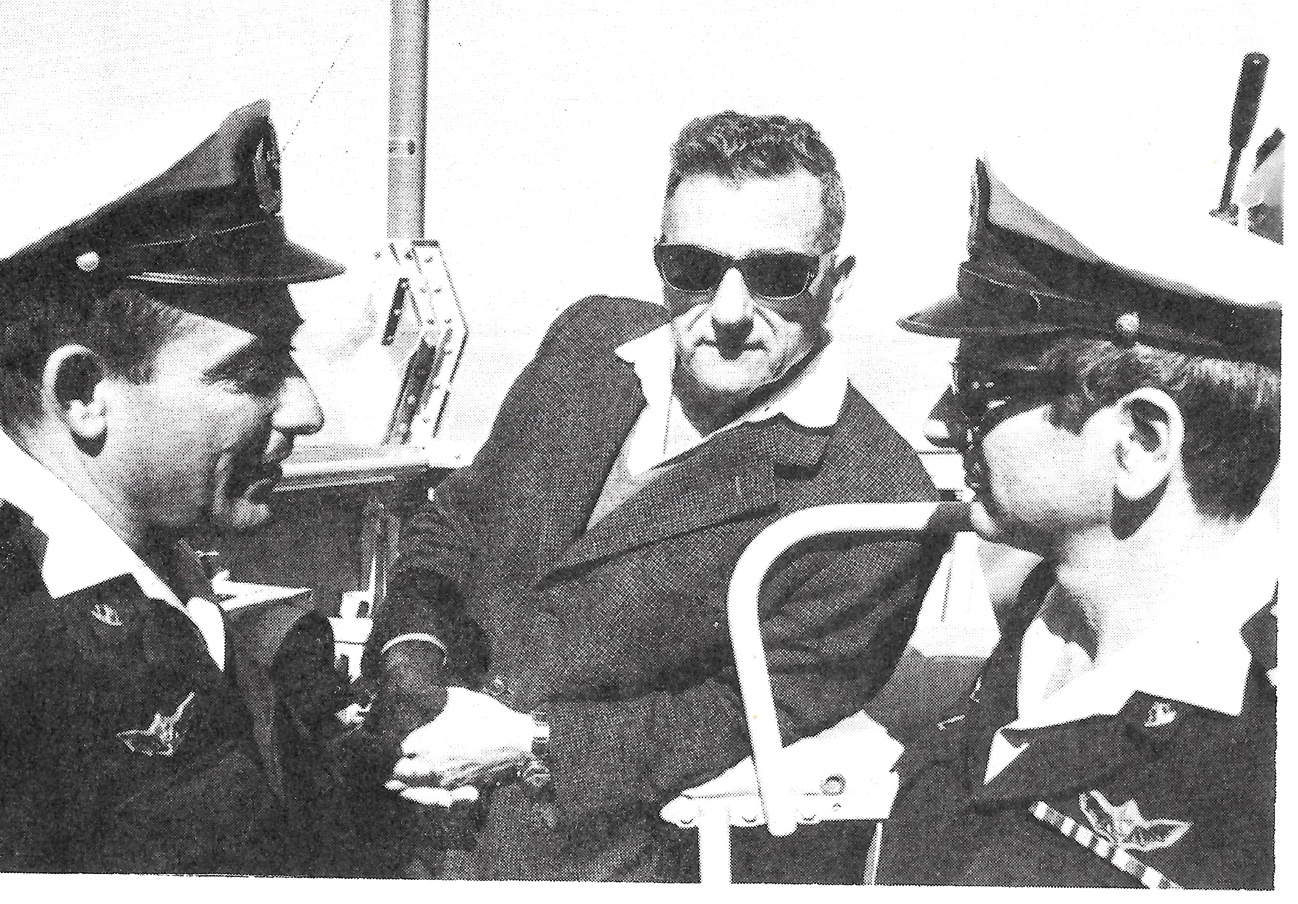 שפיר טנקוס והדר קמחי בגשר סטי"ל 1971